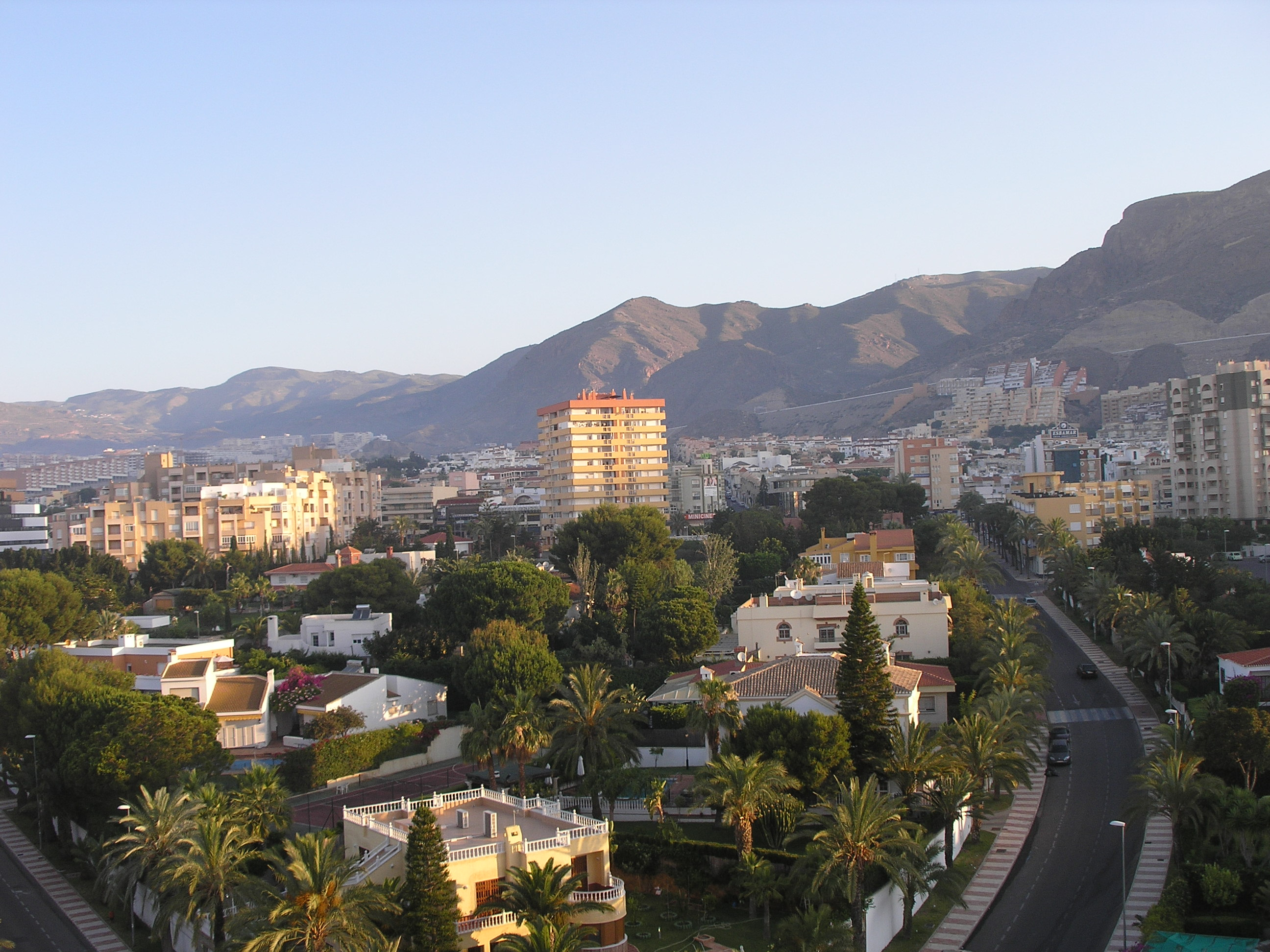 04720 Aguadulce, Almería, Spain